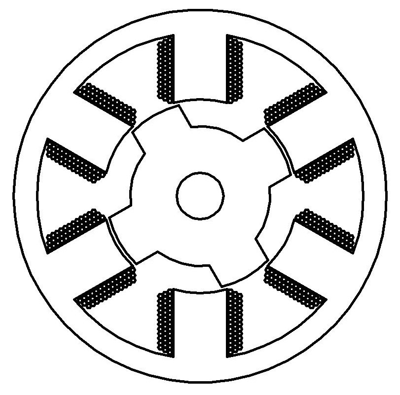 Schnittbild Reluktanzmotor